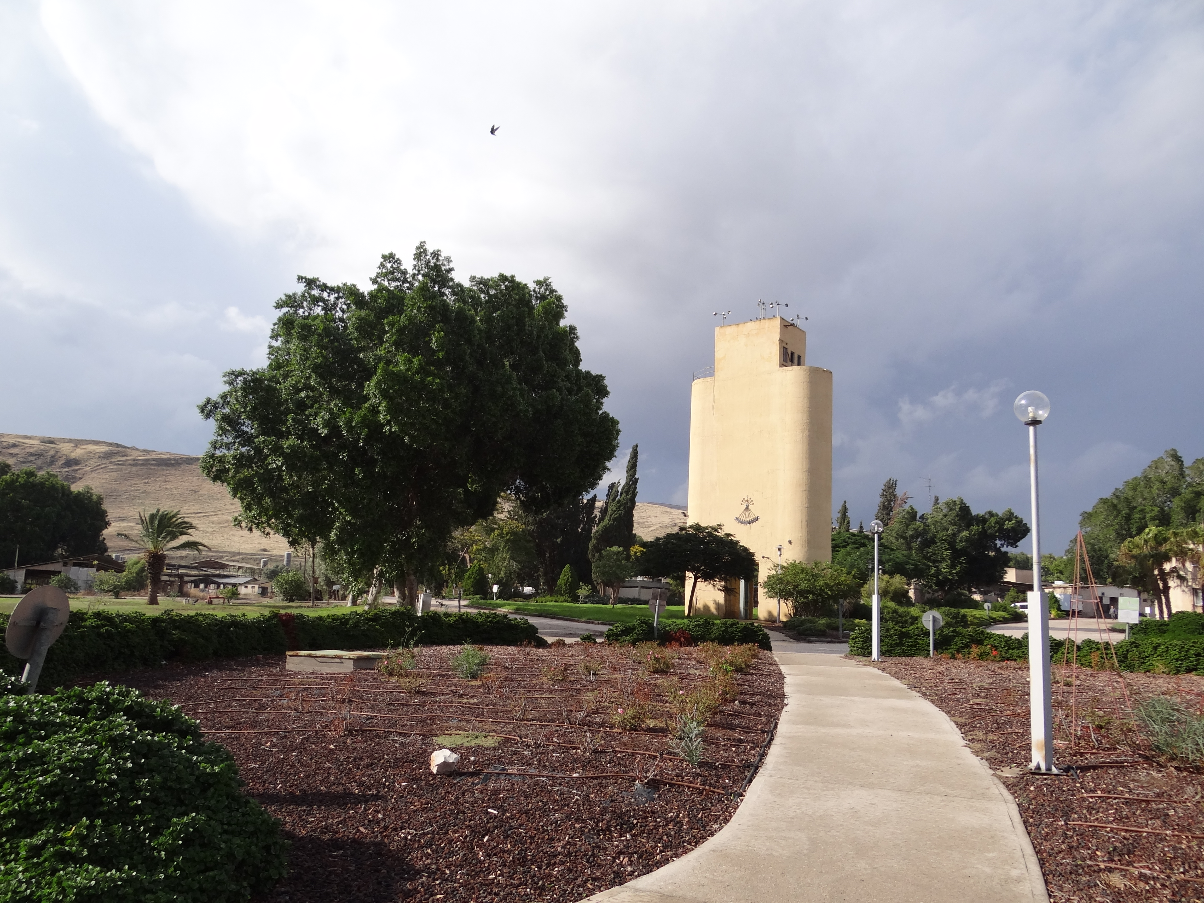 Gesher is a kibbutz in the Beit She'an Valley in northeastern Israel. Founded in 1939 by immigrants from Germany. גשר הוא קיבוץ השייך לתנועה הקיבוצית (תק"ם). מיקומו בעמק הירדן, מדרום לכנרת כ-10 ק"מ דרומית לצומת צמח, סמוך לכביש 90 (כביש הבקעה). הקיבוץ נקרא על שמו של גשר נהריים הסמוך לו.